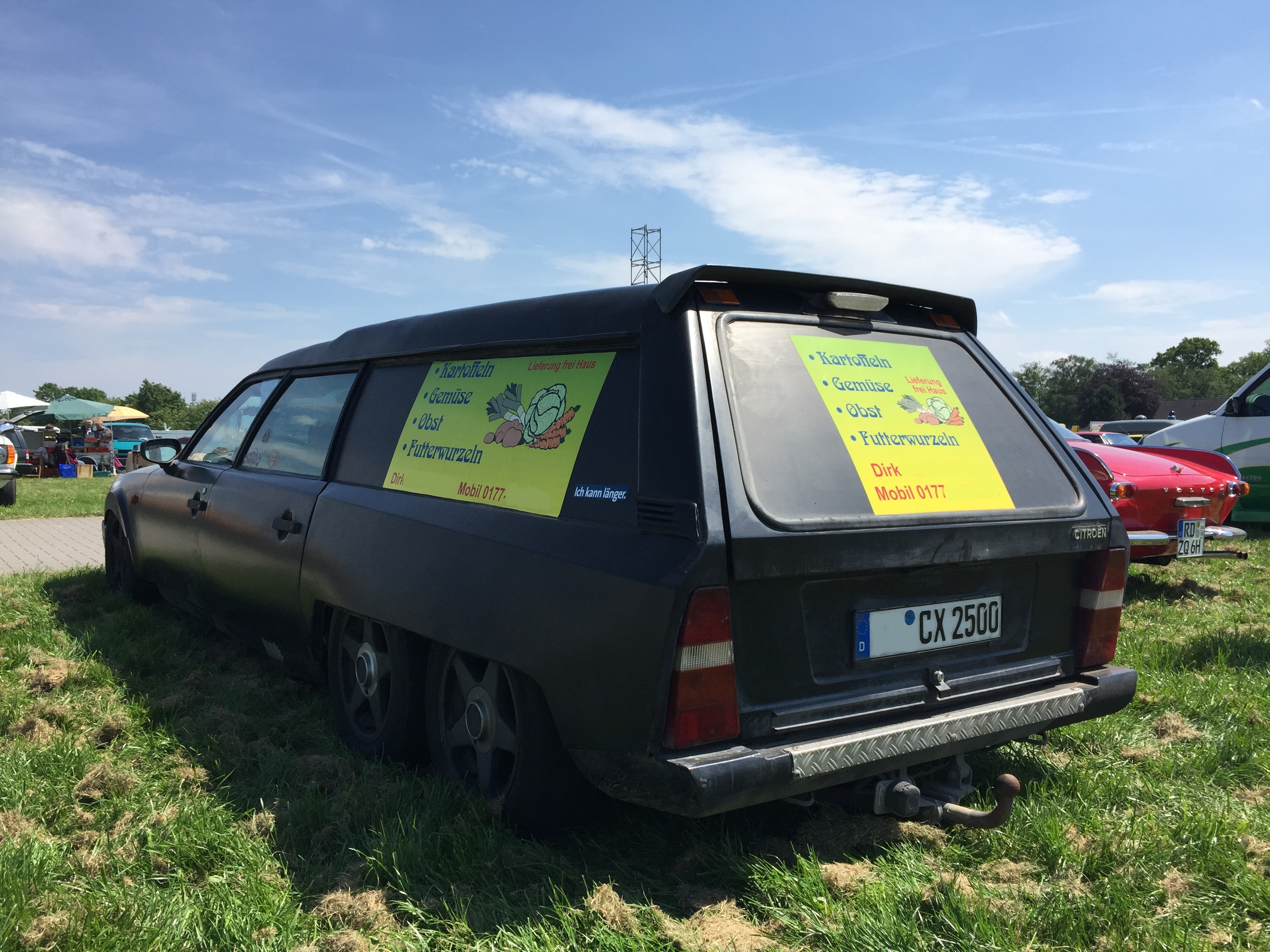 Citroen CX Loadrunner